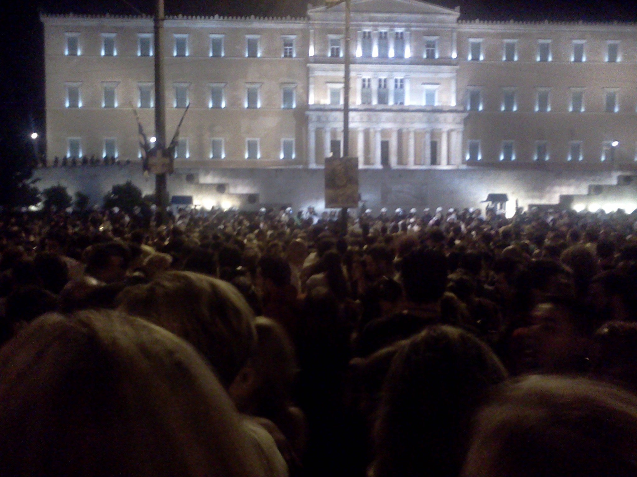 A crowd reported by news media to be 20 thousand people gathered in Constitution Square to express their dissent with the course of the country. (Οι "αγανακτισμένοι" μαζεμένοι μπροστά στη Βουλή, νύχτα, 25 Μαΐου 2011. Οι αρχικές εκτιμήσεις από τα ΜΜΕ, πχ. in.gr, μιλάνε για 20 χιλιάδες άτομα εκεί και δεκάδες χιλιάδες επίσης σε άλλες πόλεις της Ελλάδας.) Sorry for the poor quality, cell phone photo...